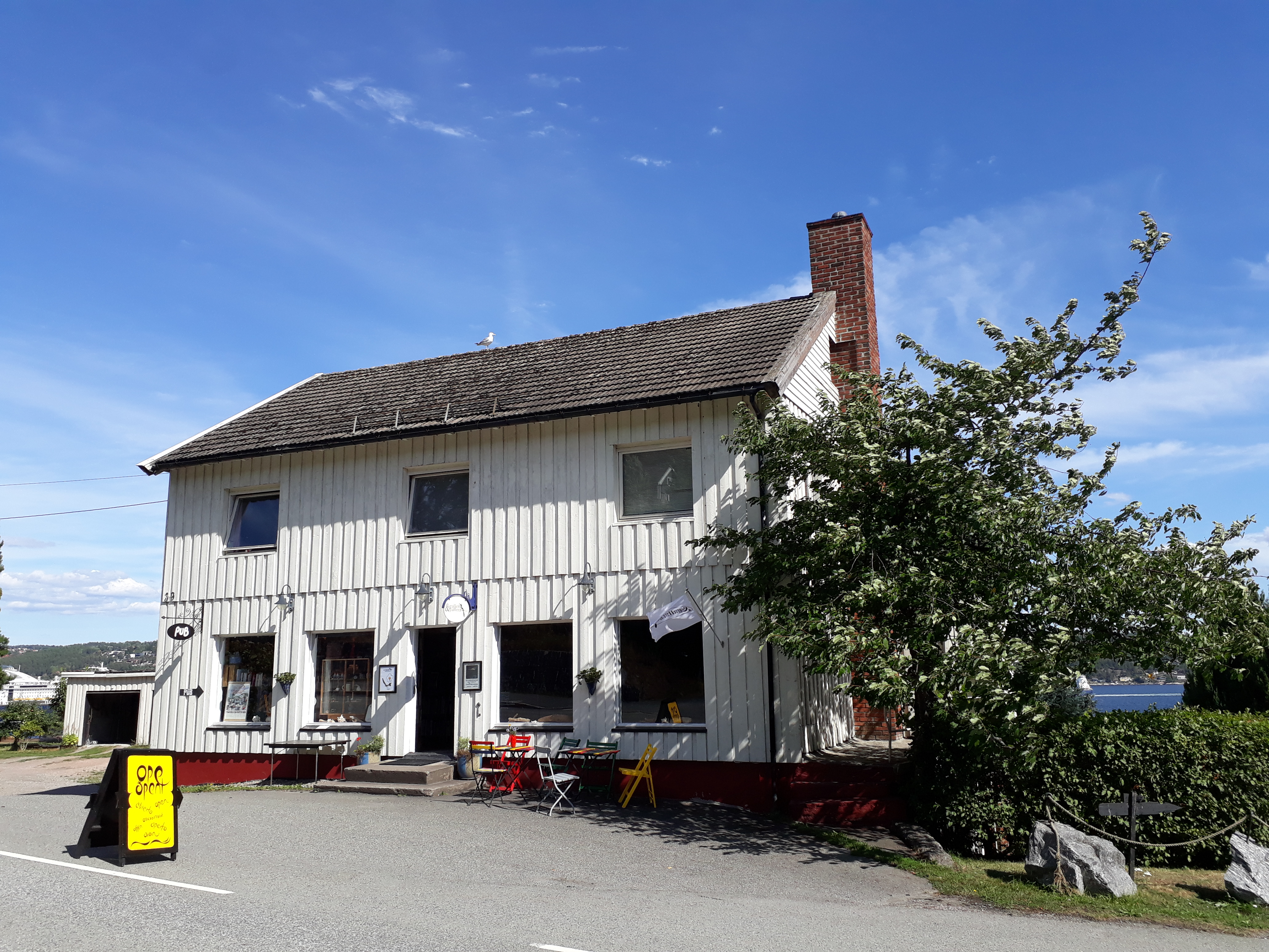 Galleriet på sommeren.